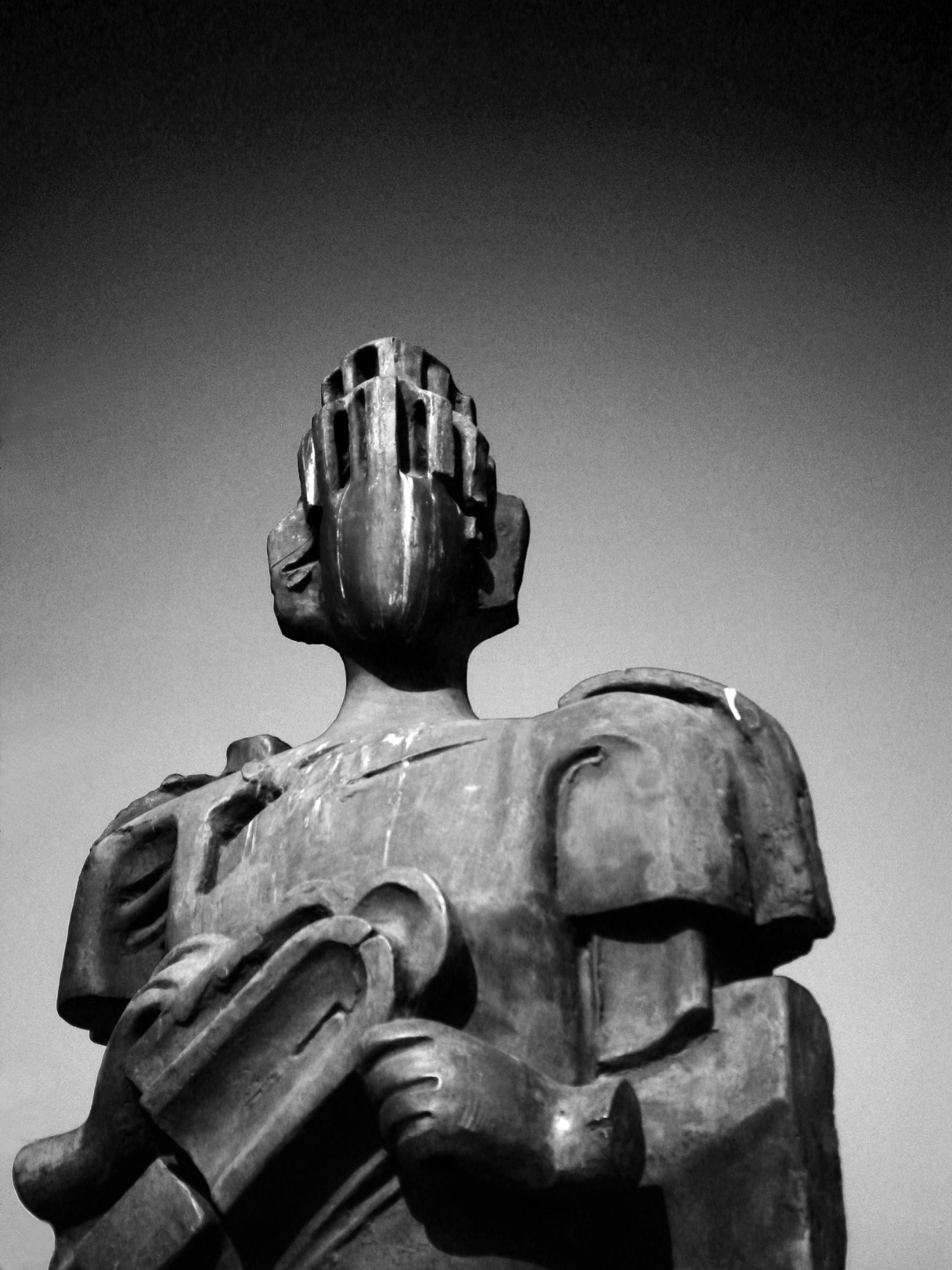 Spomenik despotu Stefanu se nalazi na Kalemegdanu i rad je vajara Nebojše Mitrića.